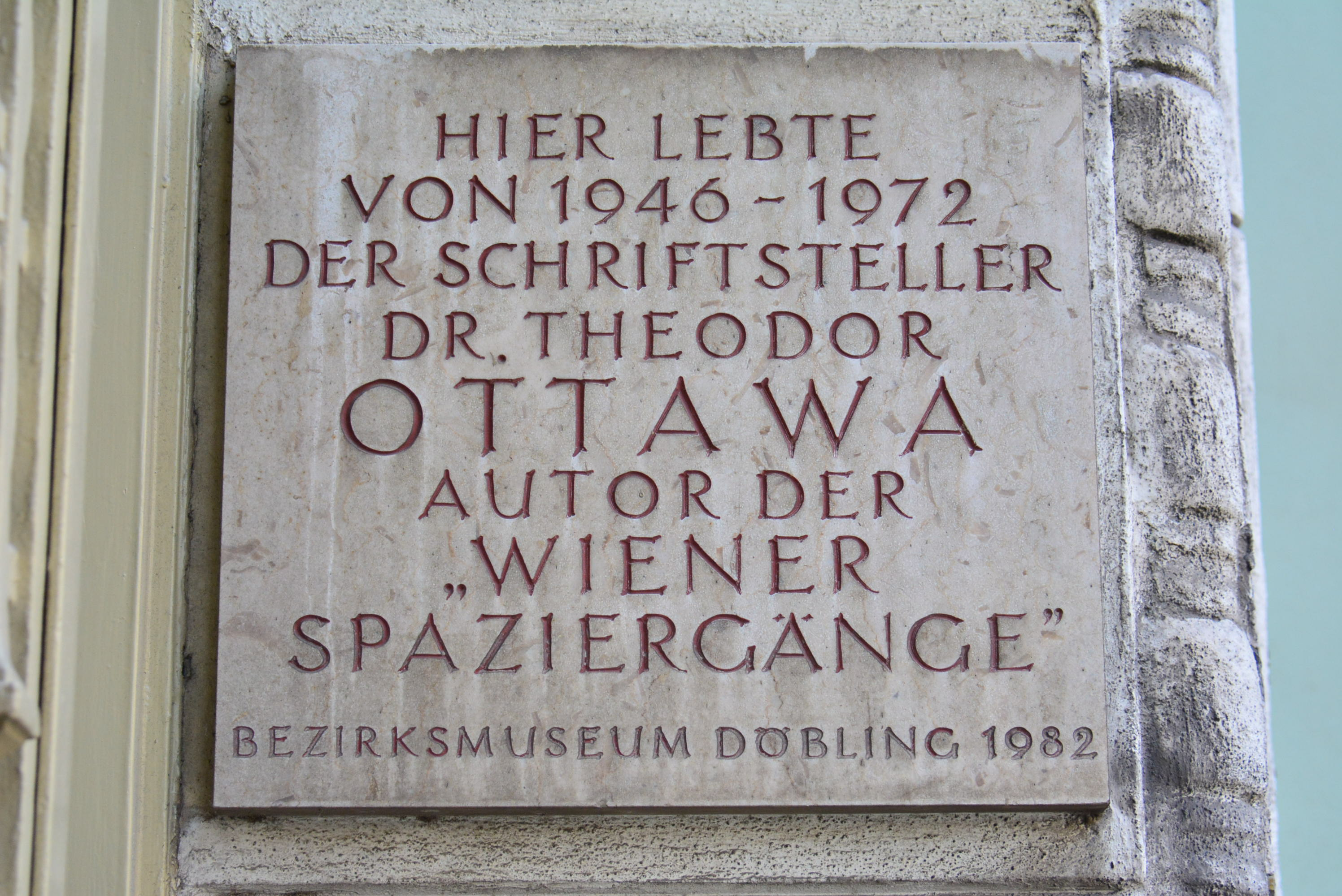 Gedenktafel für Theodor Ottawa (Wien, Döblinger Hauptstraße 56)